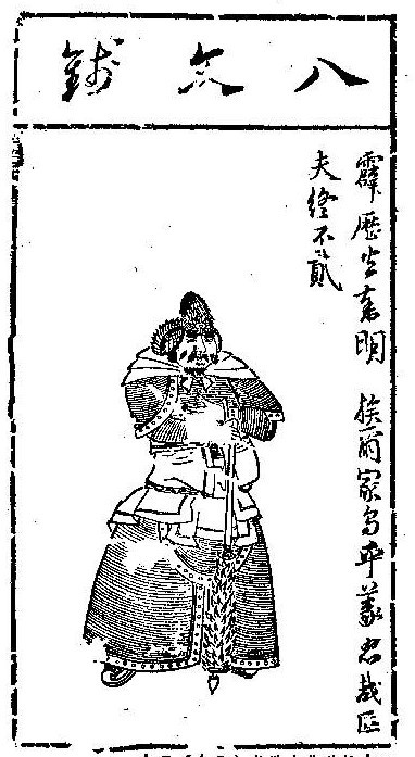 中文（中国大陆）: 明 陈老莲 木刻版画 水浒叶子 秦明